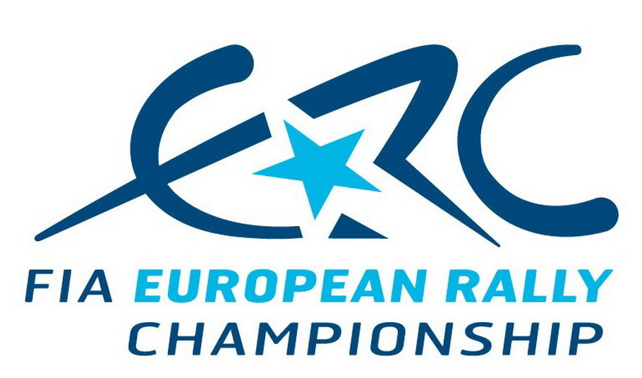 Логотип Европейского Чемпионата по Ралли